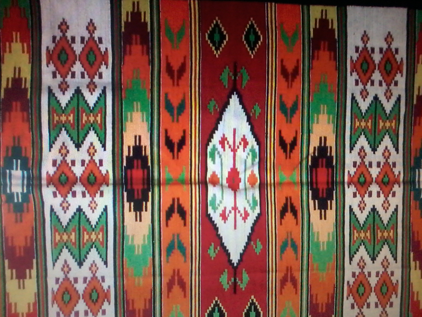 Знято мобілкою з монітора